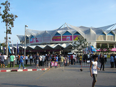 Indoor Stadium Huamark